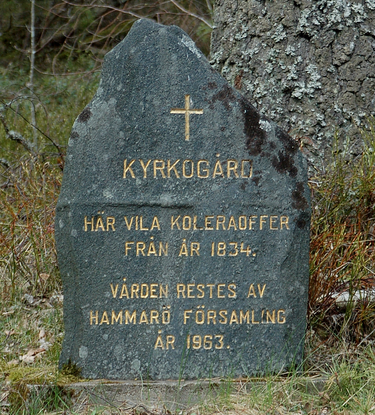 monument rest över Kolerakyrkogården i Skoghall